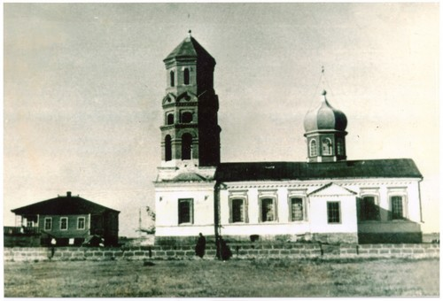 Церковь Успения Пресвятой Богородицы (1908 год) в хуторе Курган, Азовский район Ростовской области.